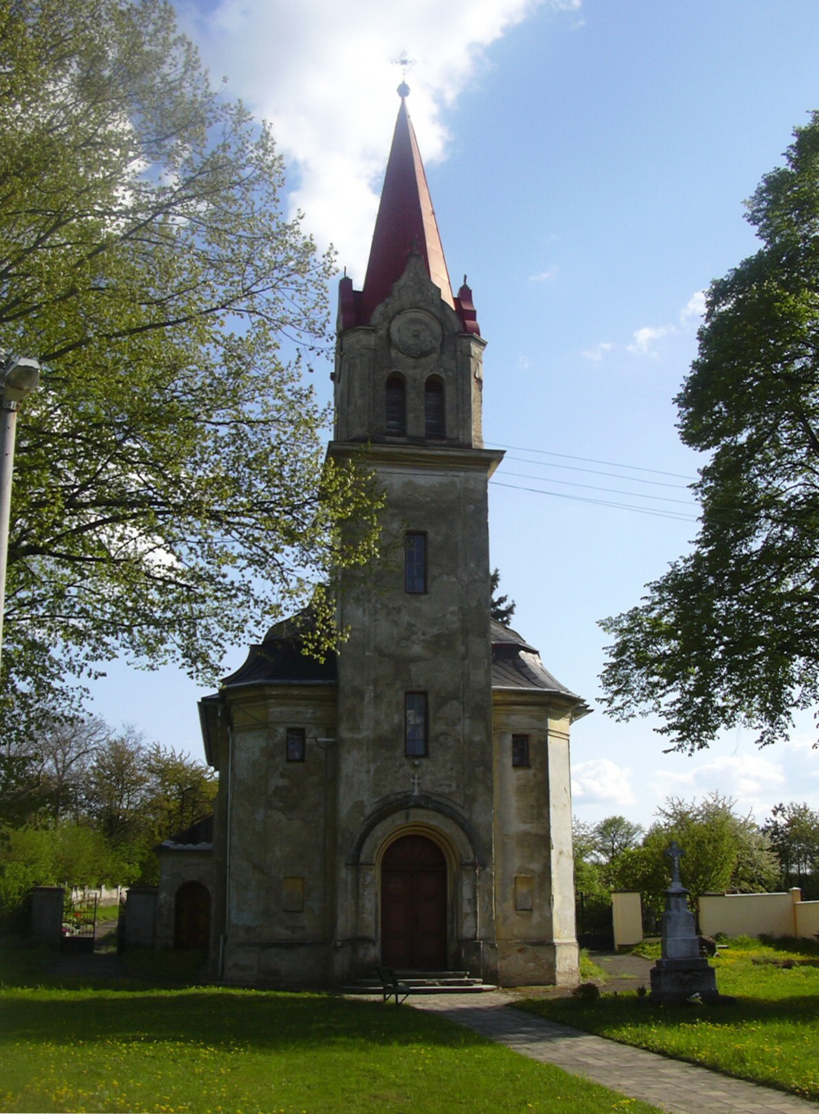 Filiální kostel Nejsvětějšího Srdce Páně, Lysovice (Vyškov District - Czech Republic)